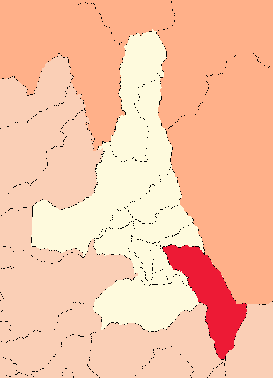 Área del distrito de Daniel Alomía Robles.